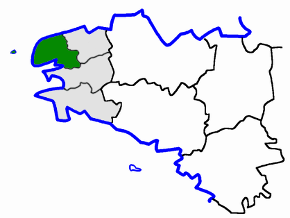 Arrondissement of Brest, Département Finistère, France